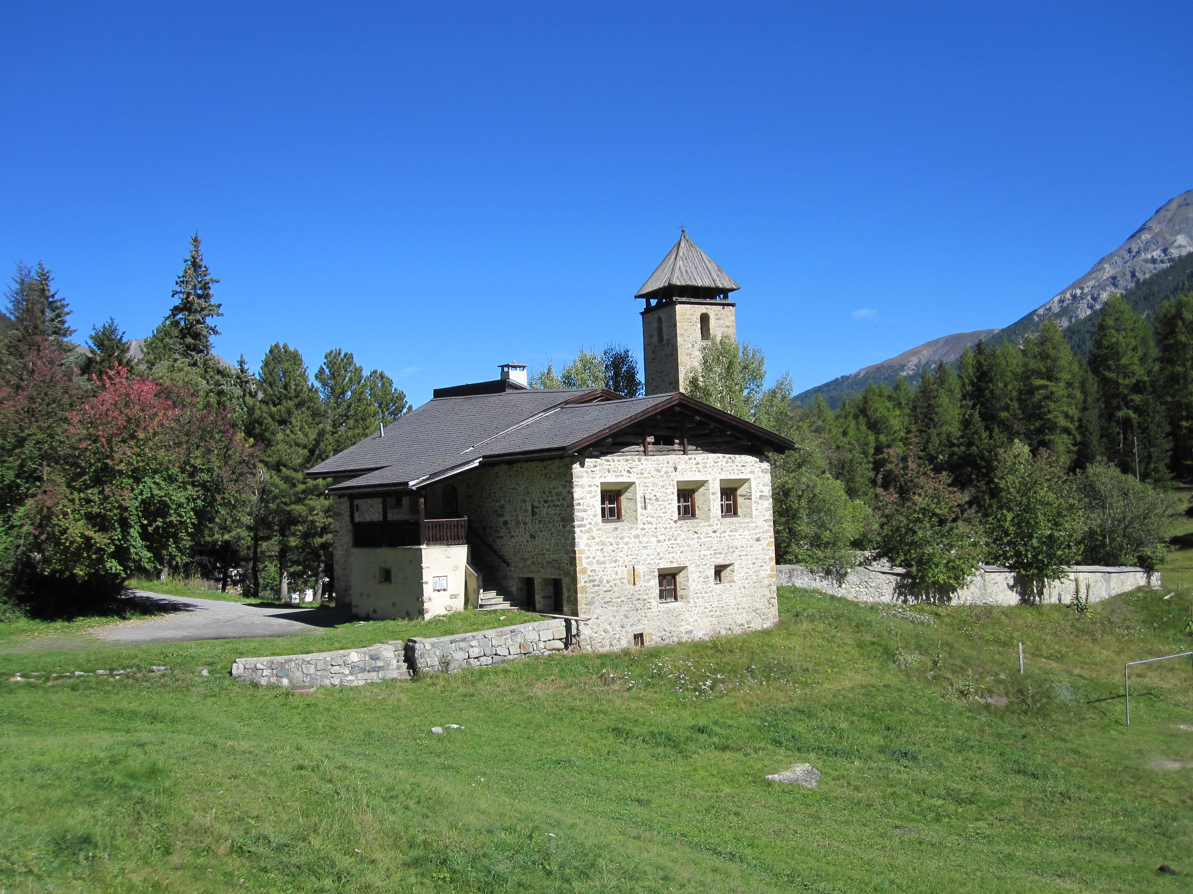 Hospiz und Kirchturm in Chapella (politisch zu S-chanf gehörig, Oberengadin, Kanton Graubünden)